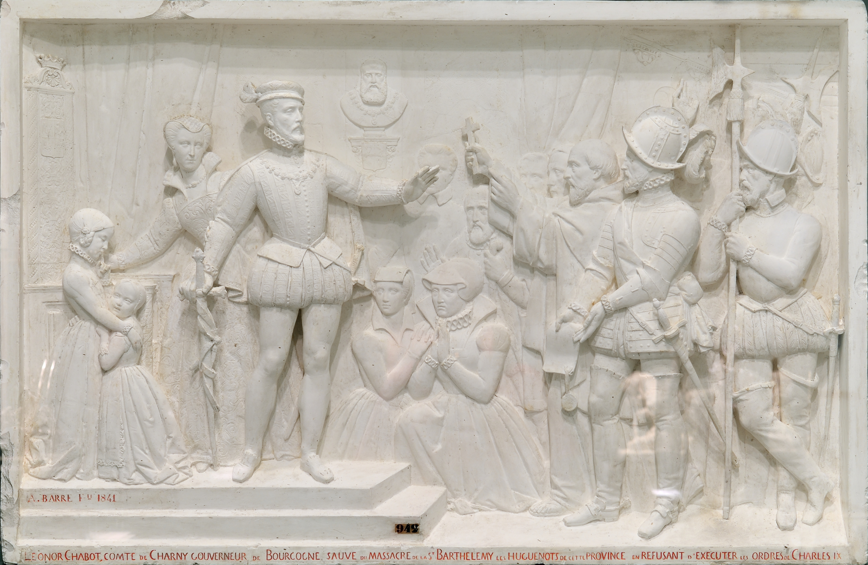 Léonor Chabot, comte de Charny, gouverneur de Bourgogne, sauve du massacre de la Saint-Barthélemy les Huguenots de cette province en refusant d’exécuter les ordres de Charles IX, Haut-relief en plâtre de Jean Auguste BARRE (1811-1896). Exposé au Musée des beaux-arts de Lyon en 2014.